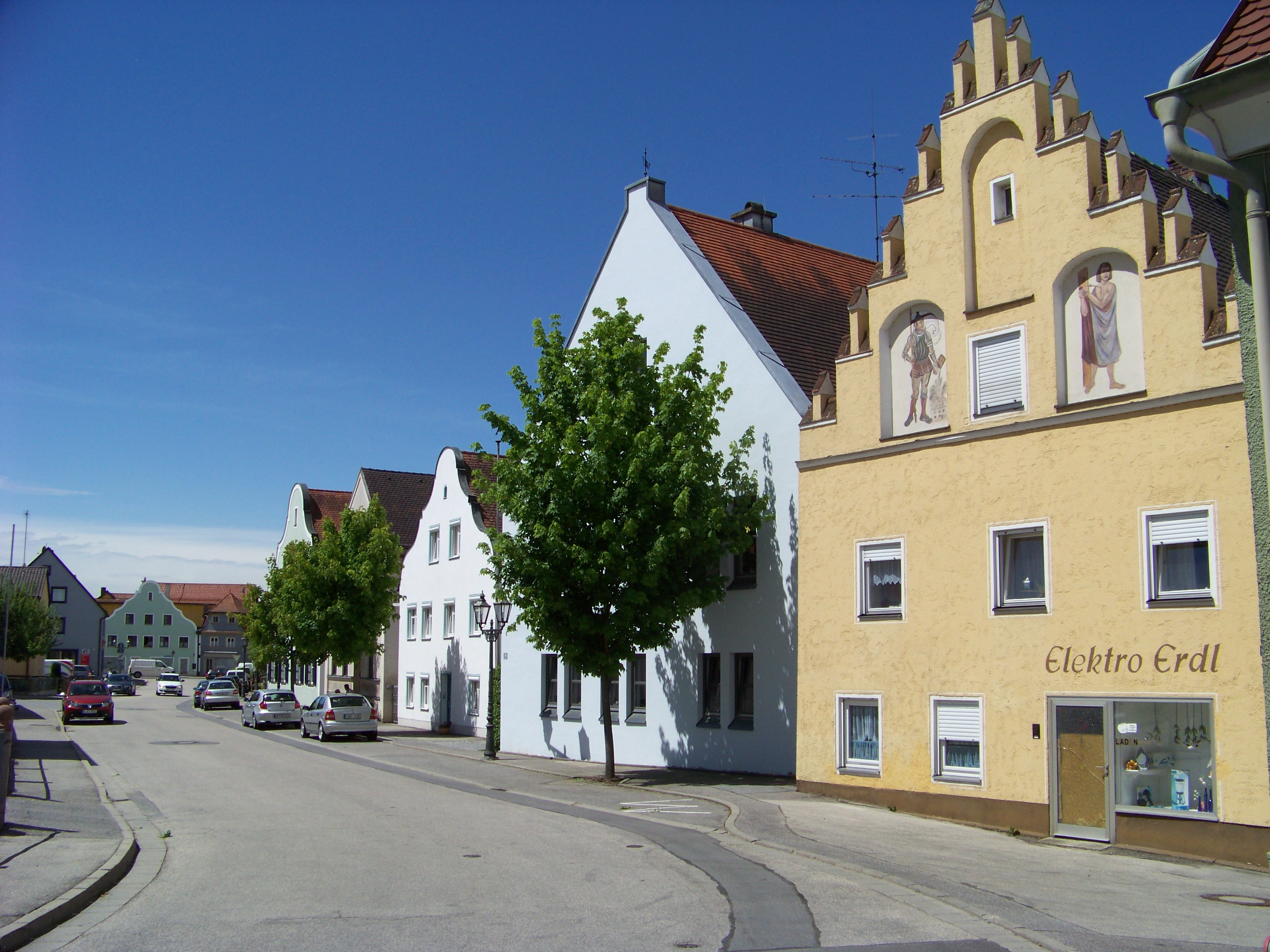 Geiselhöring, Ensemble Viehmarktplatz. Zeile zweigeschossiger massiver Giebelhäuser, zum Teil mit Wellengiebeln und Treppengiebeln.